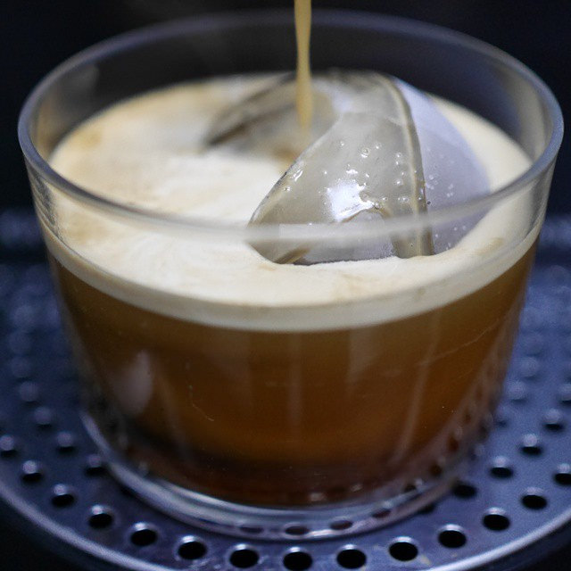 Un vaso de café con hielo, en Villaverde (Madrid).